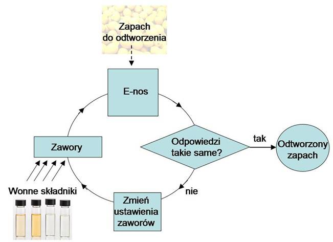 Odour recorder - schema